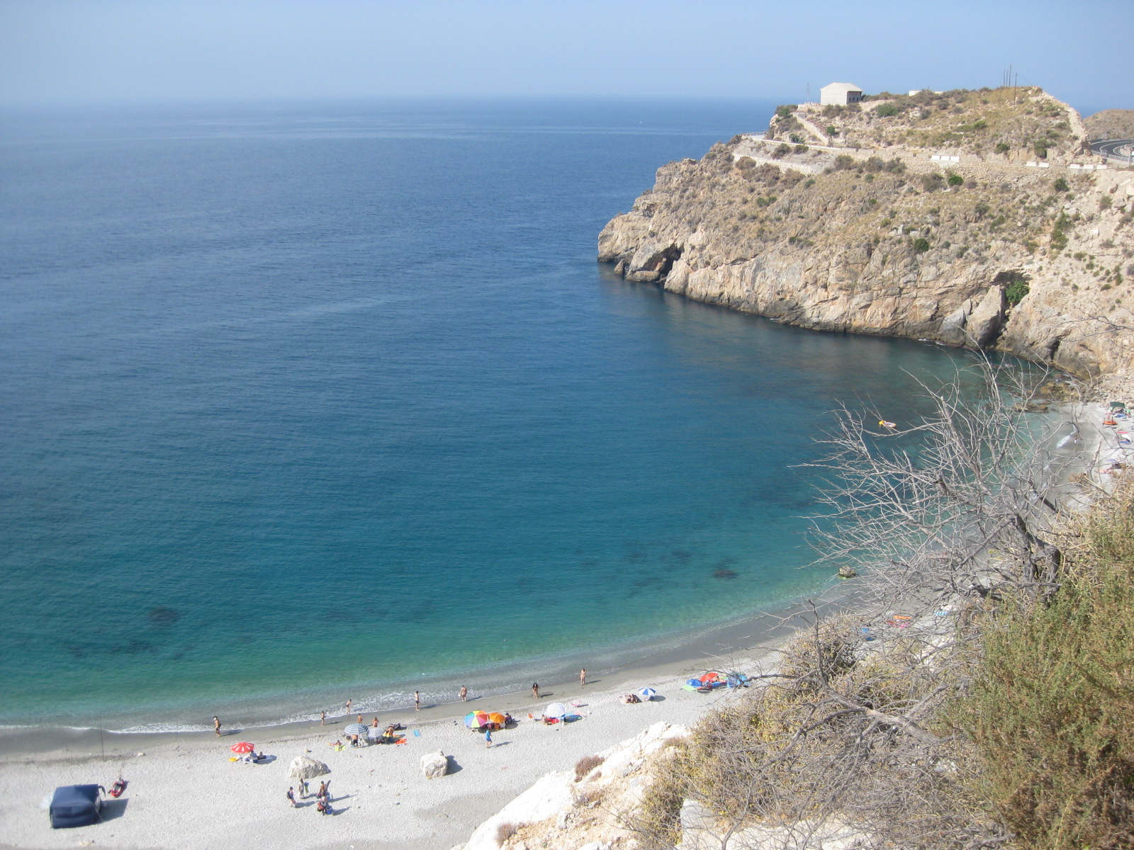 Playa de la Rijana. Julio de 2013